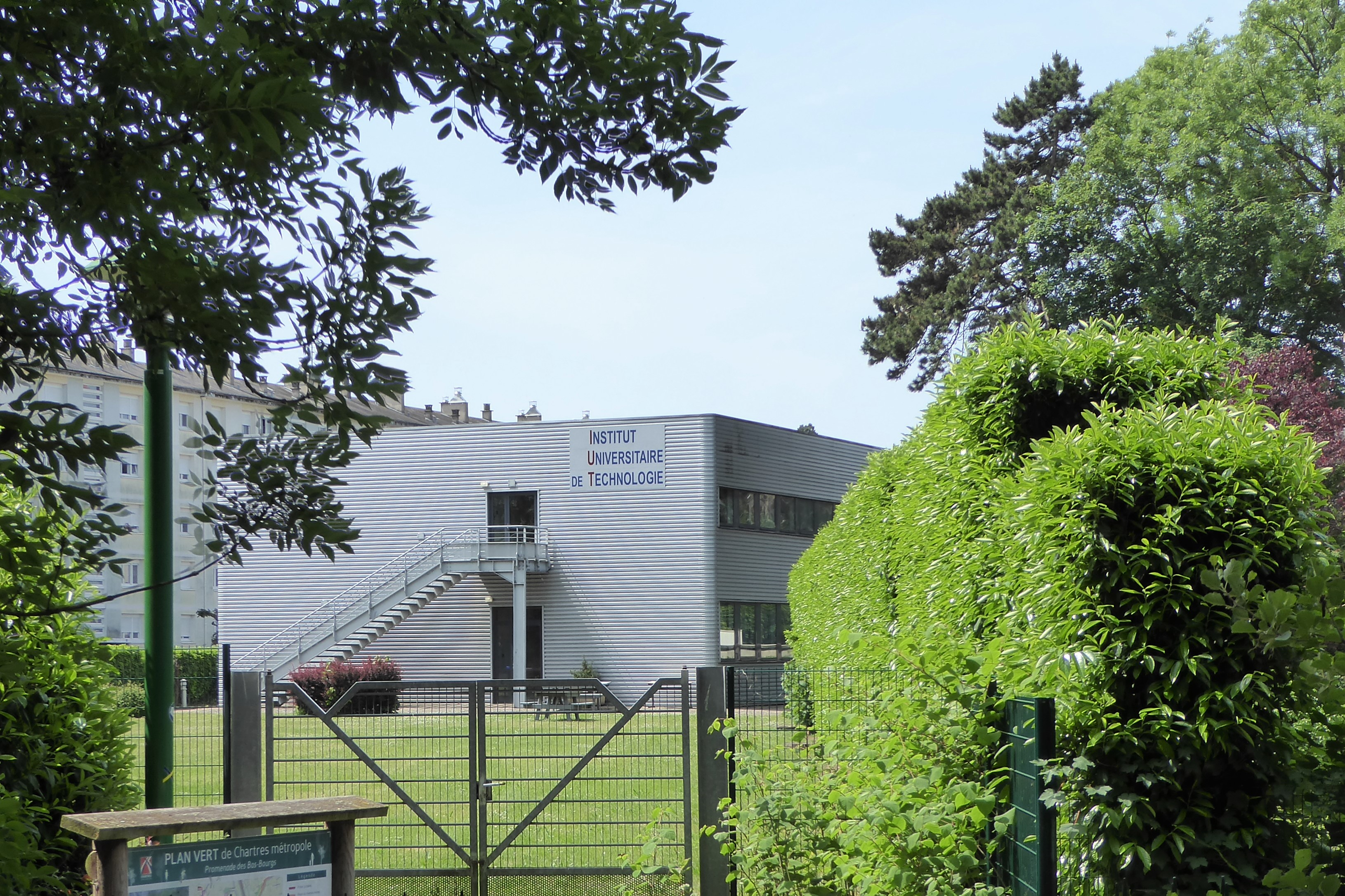 Institut universitaire de technologie (IUT), Chartres, Eure-et-Loir, France.